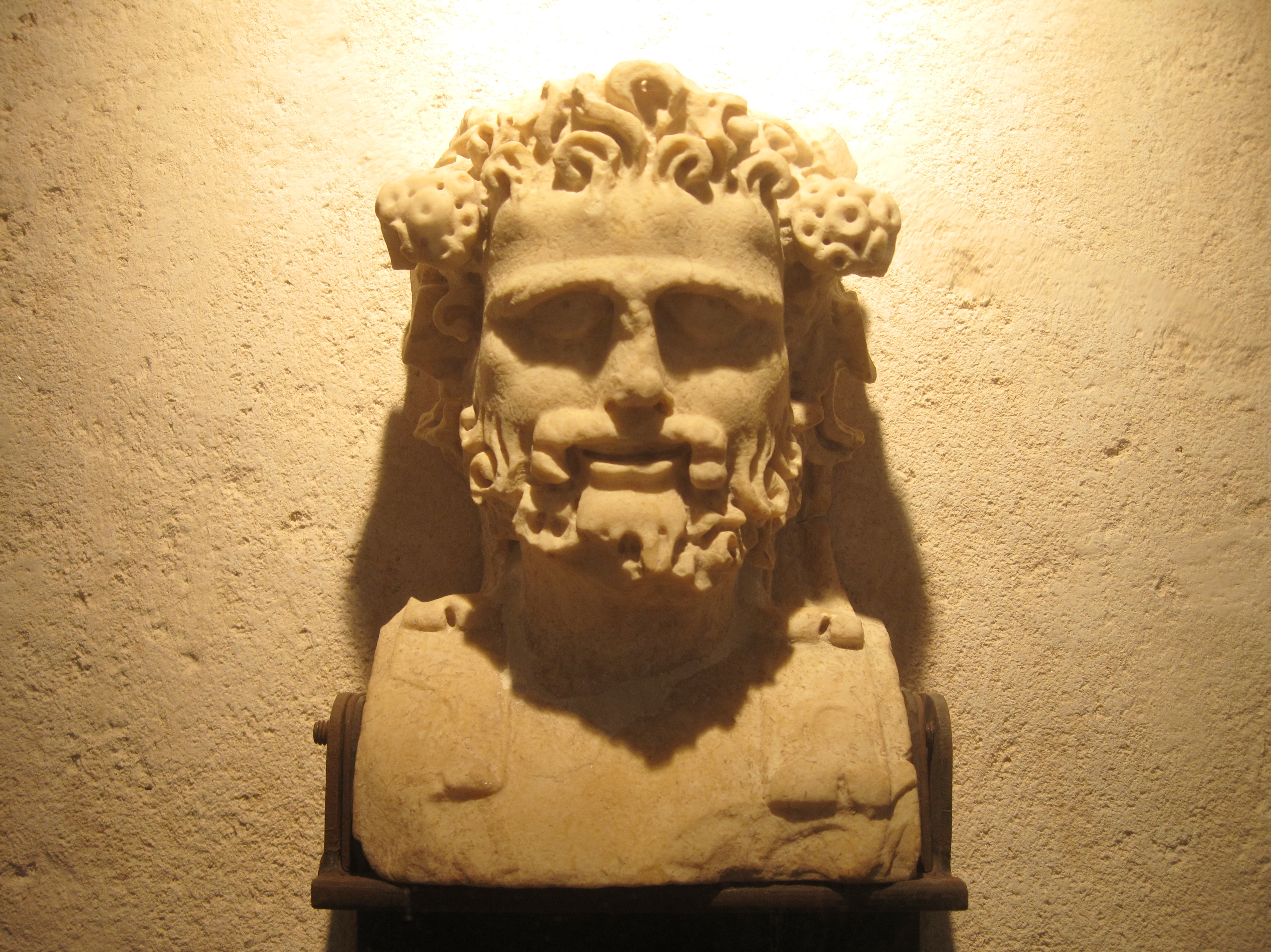 Kopf des Gottes Bacchus aus der Zeit vom 2. Jahrhundert v. Chr. bis zum 5. Jahrhundert n. Chr. im Römischen Saal des Historischen Museums von Manacor (Museu d’Història de Manacor), Fundort Son Mas, Gemeinde Manacor, Mallorca, Spanien